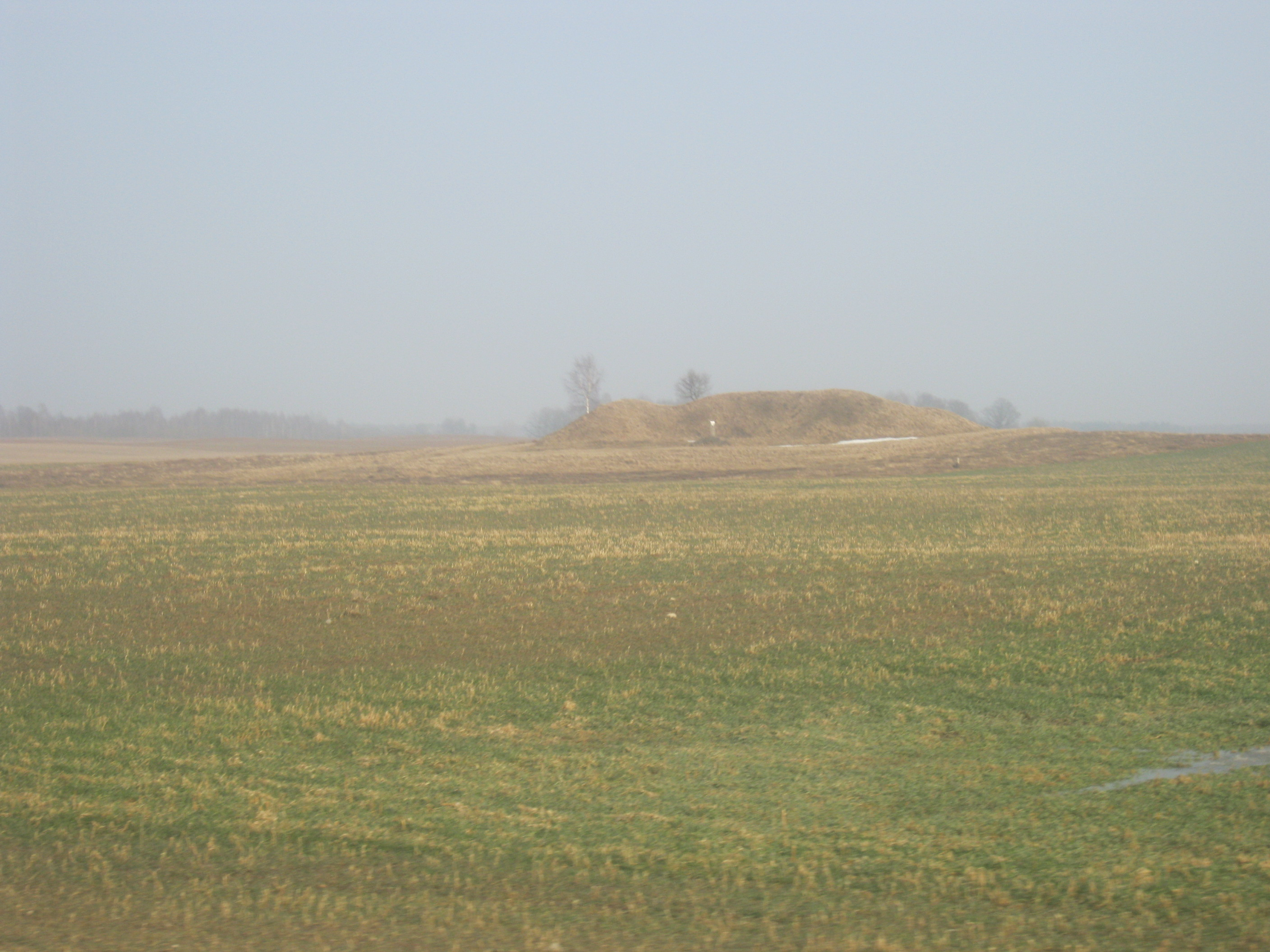 Piliakalnių piliakalnis